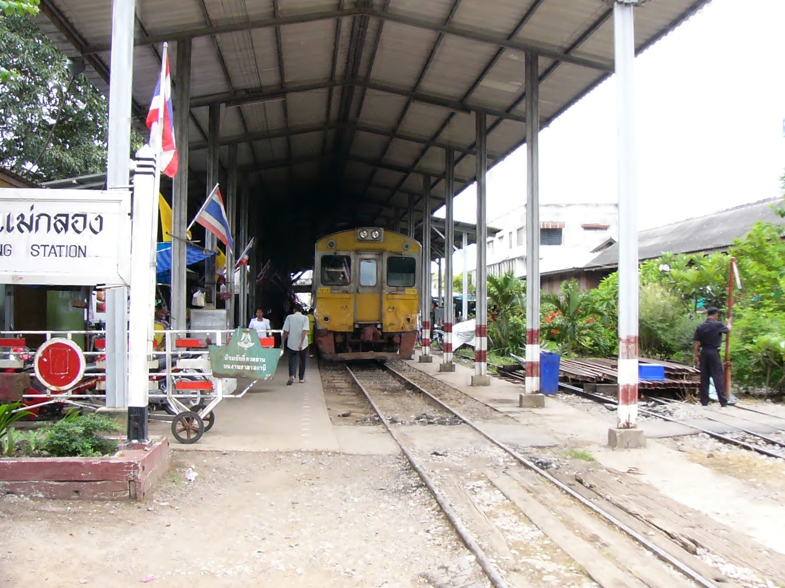 全体が屋根に覆われたメークローン駅